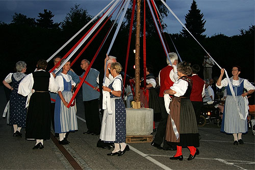 Reinach: Volkstanzgruppe an der 1. August-Feier